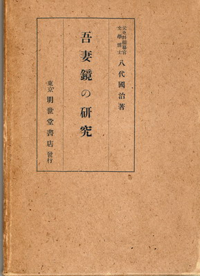 八代国治『吾妻鏡の研究』の表紙